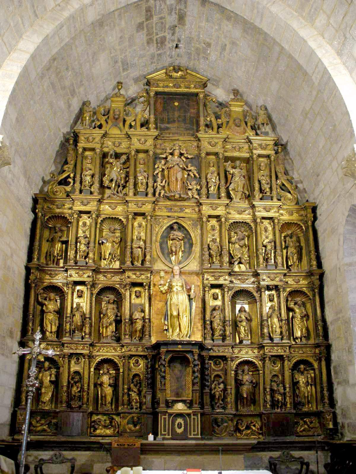 Iglesia de la Magdalena, Tudela (Navarra). Retablo mayor